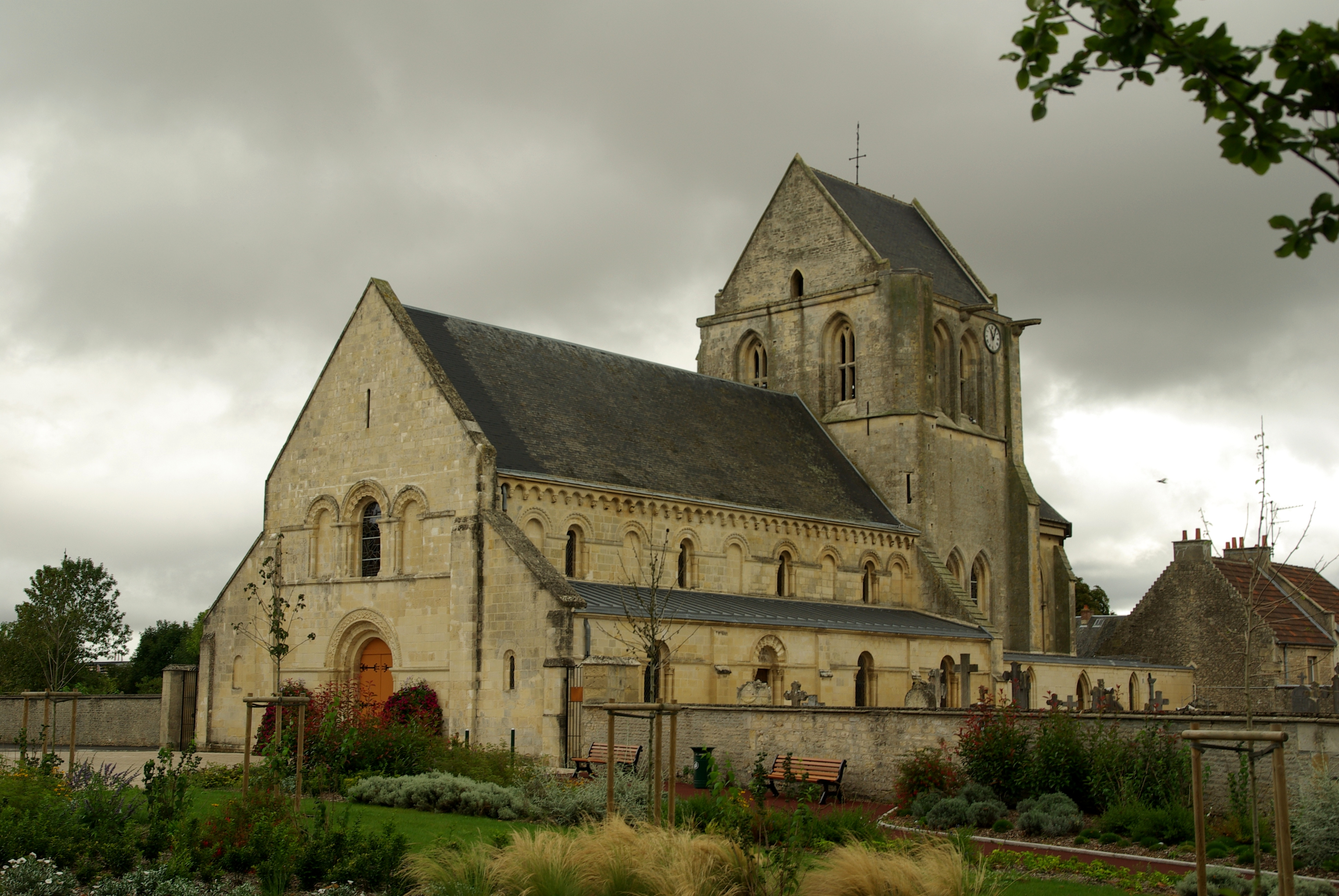 L'église St Martin-de-la-Trinité à Carpiquet.